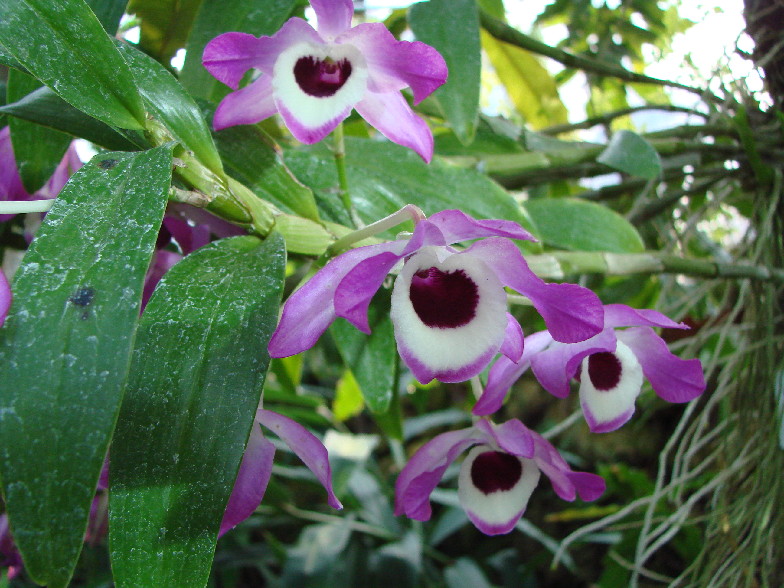 Jardin botanique de l'Université de Zurich (Suisse) : Dendrobium nobile Lindl. (1830)